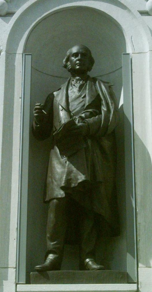 James Bruce, Lord Elgin (1811-1863), statue de la façade de l'hôtel du Parlement, Québec